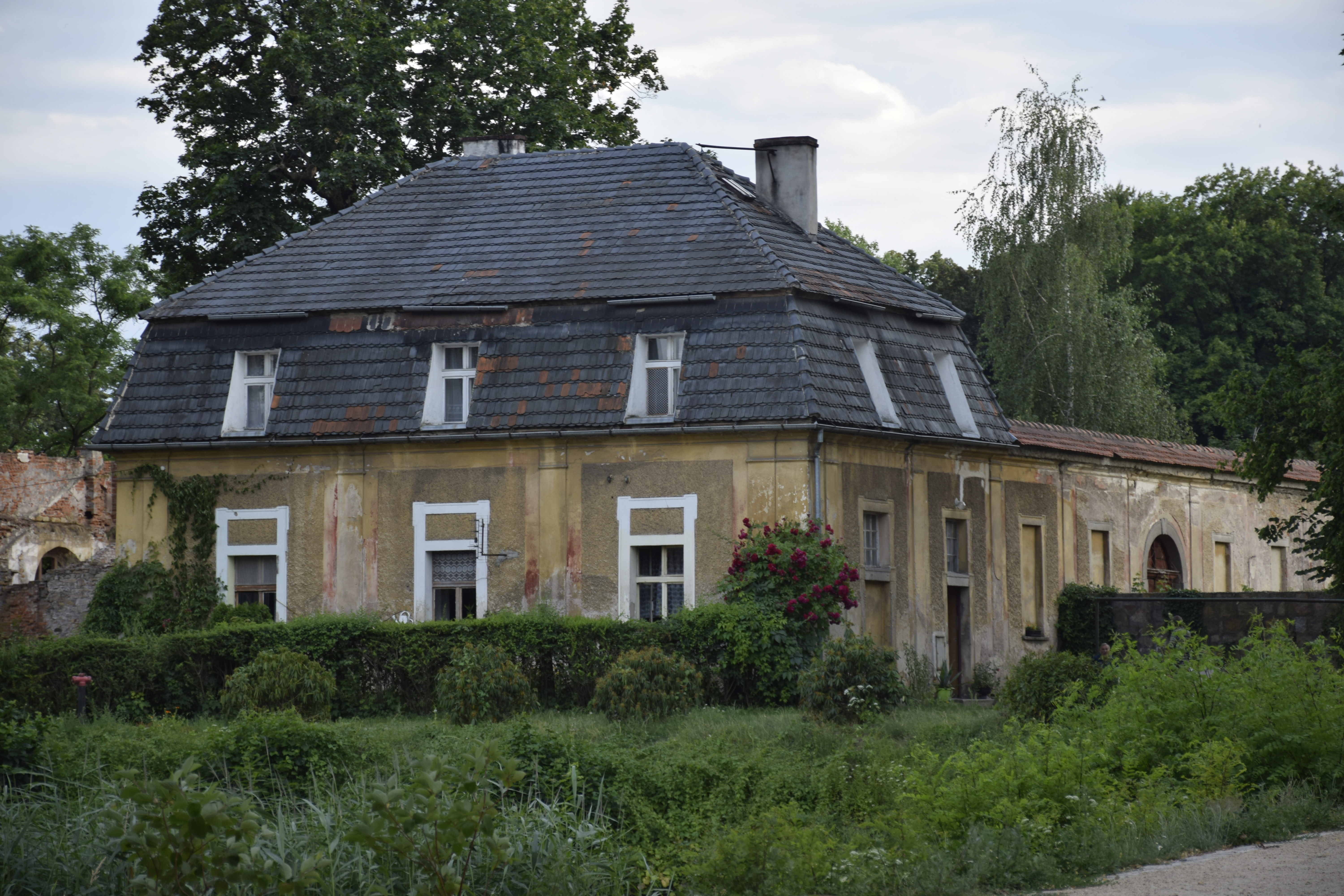 Roztoka (województwo dolnośląskie). Polska.